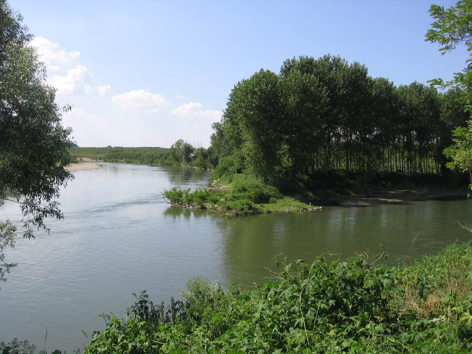 Fiume Serio alla confluenza con il fiume Adda, loc. Bocche di Serio (Cremona)